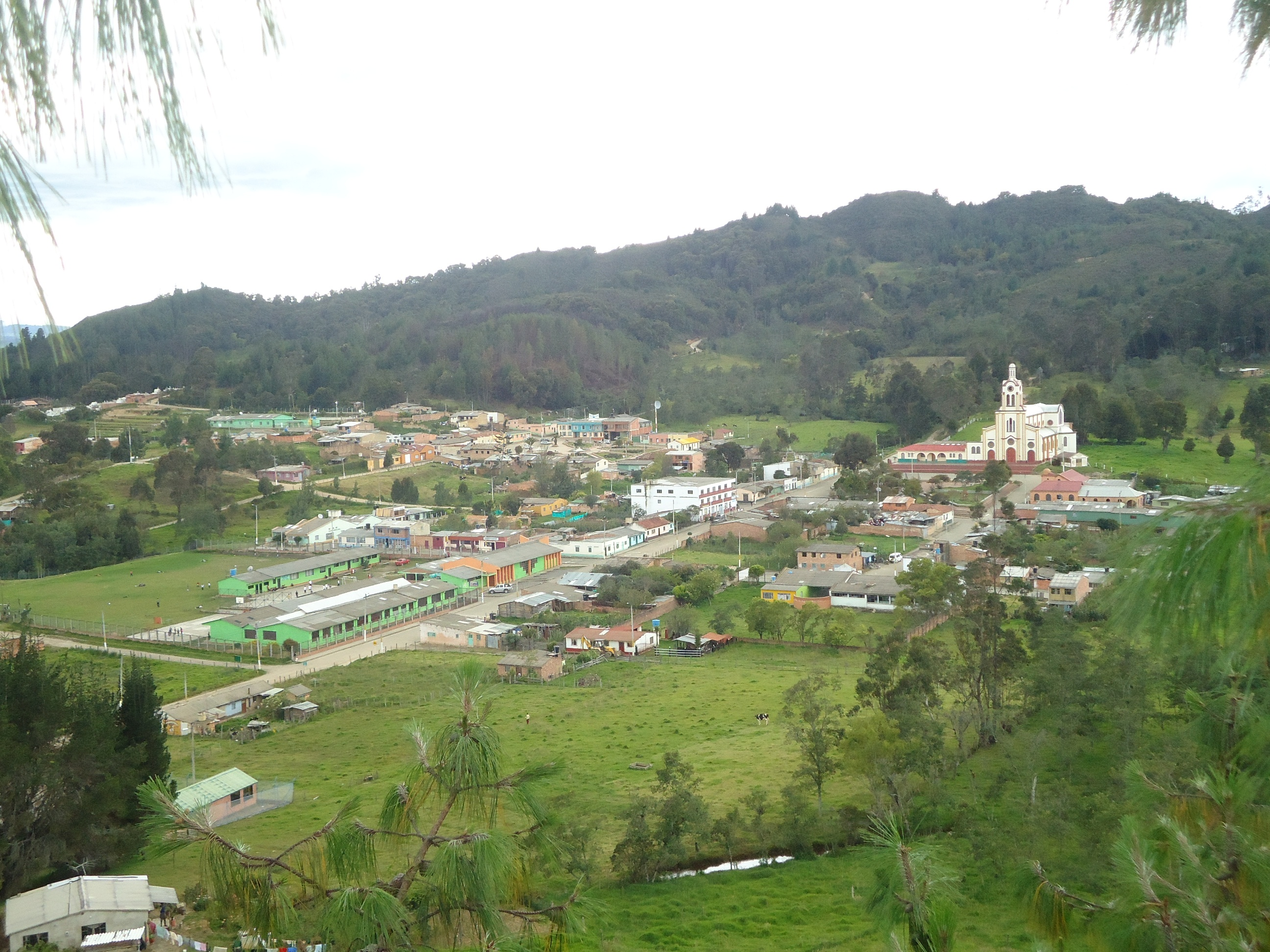 Panorámica del área urbana del municipio de San Miguel de Sema, Boyacá, Colombia